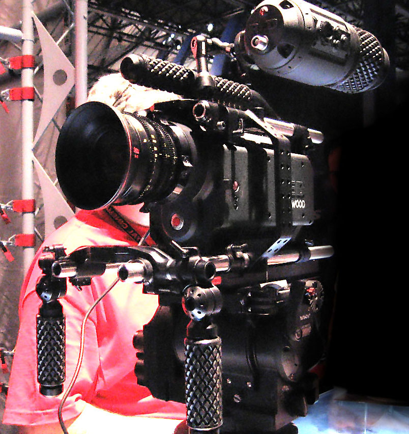 Red One Kamera auf der IBC 2007